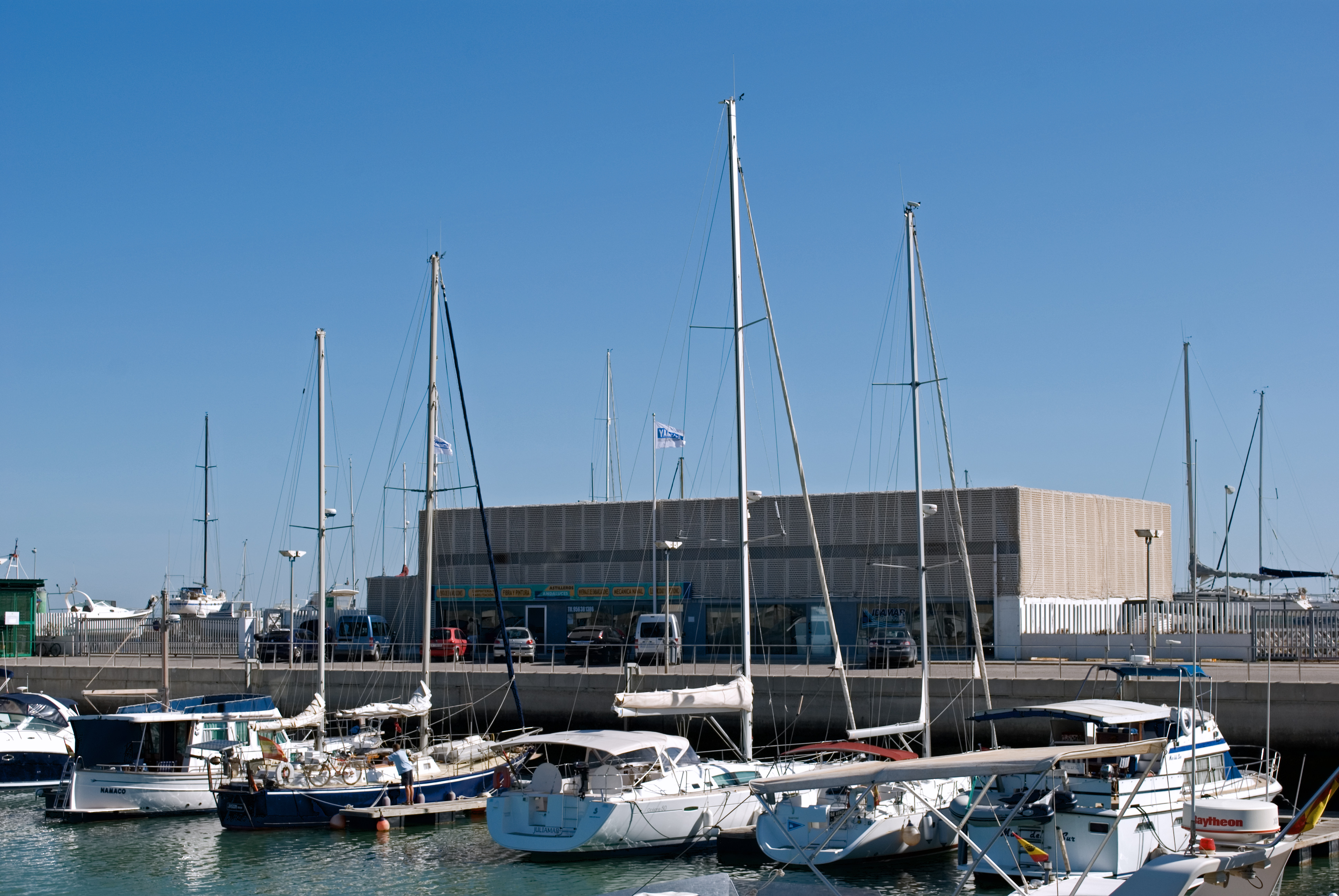 Puerto deportivo de Chipiona, provincia de Cádiz. Construcciones de los arquitectos Antonio Cruz y Antonio Ortiz